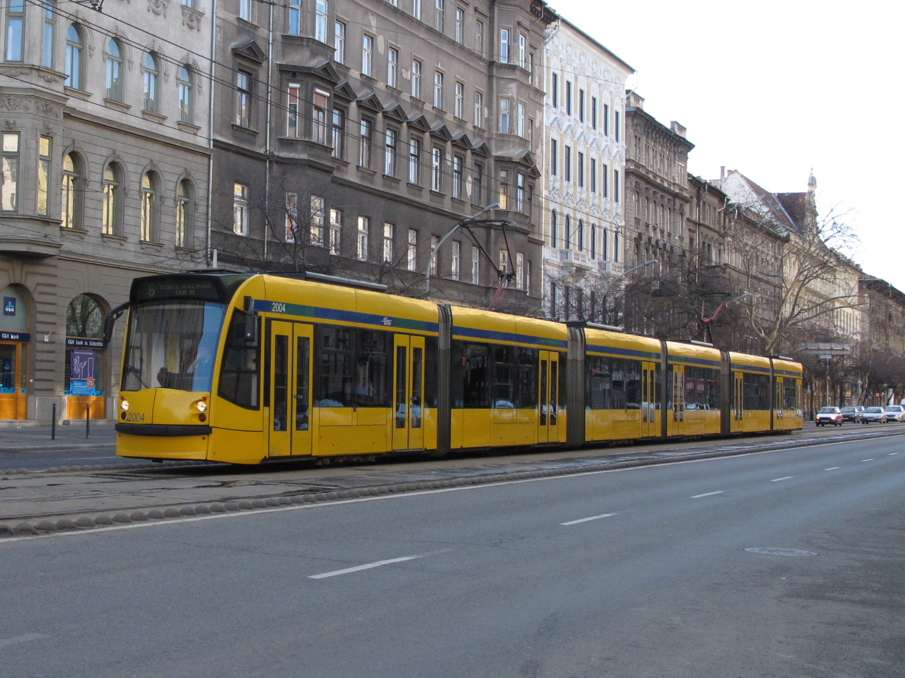 Combino 2004 bedient die Linie 6 in Budapest.